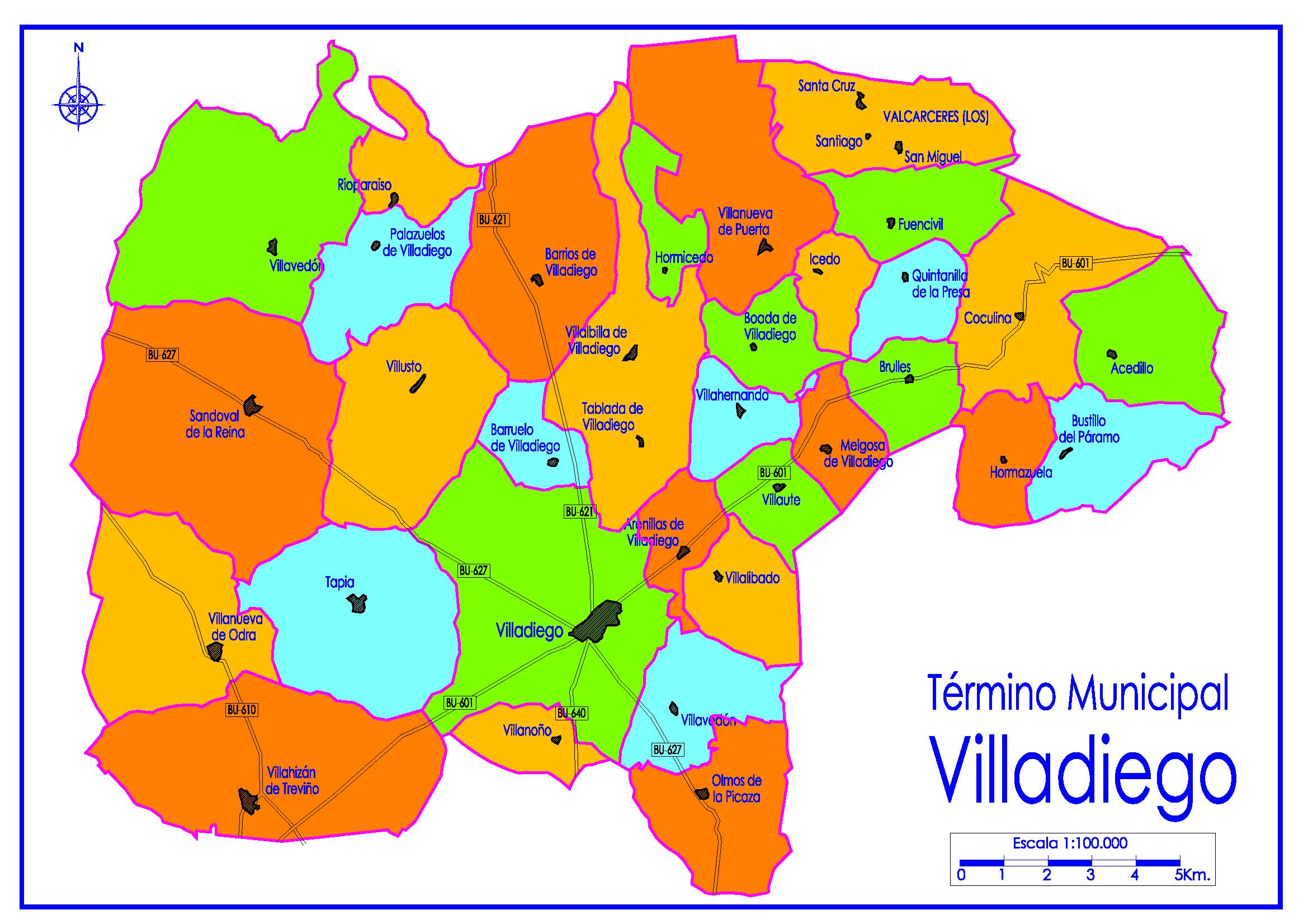 Término de Villadiego, Burgos, España